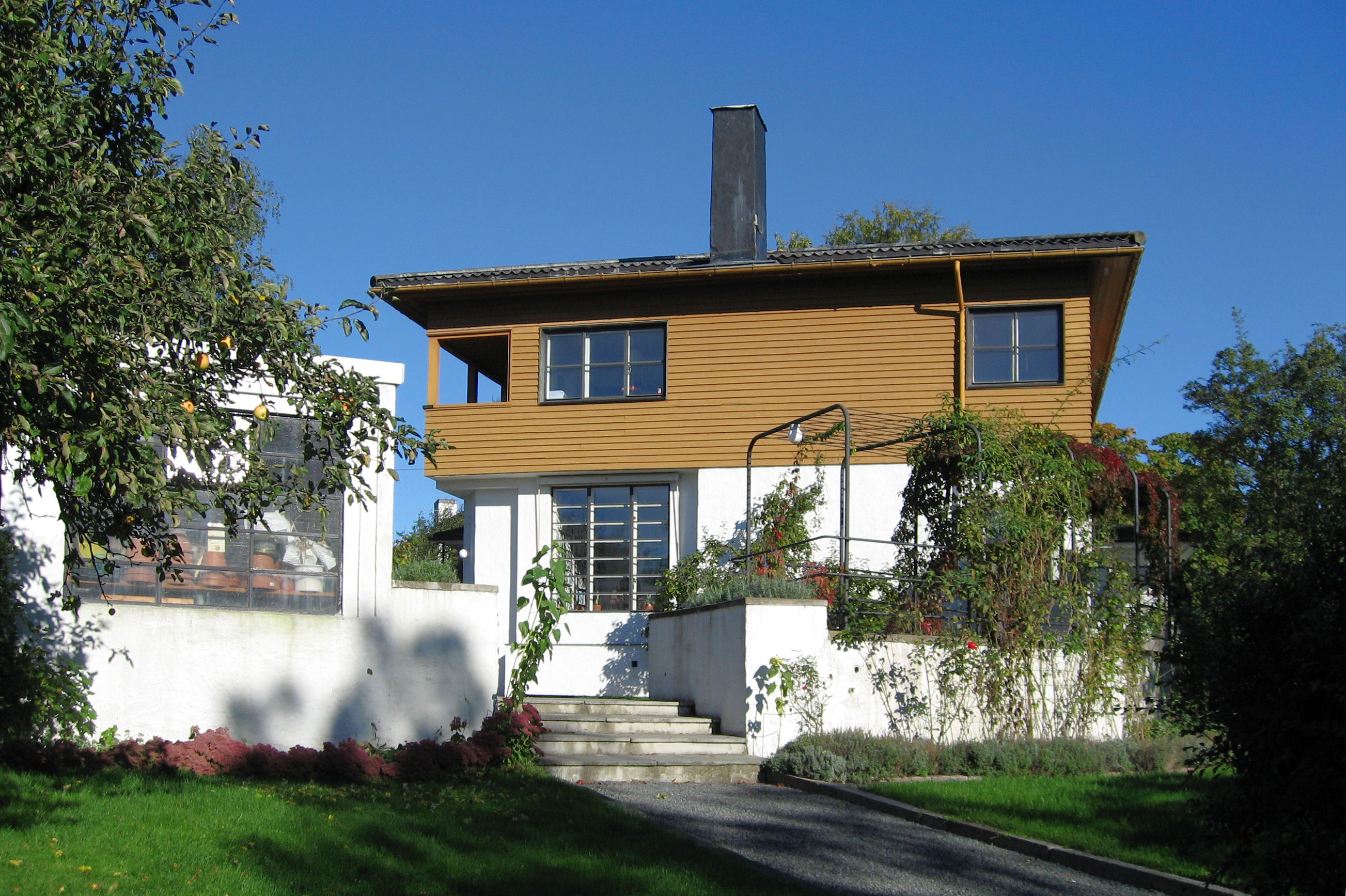 Lille Frøens vei no. 16, (Oslo, Norway)